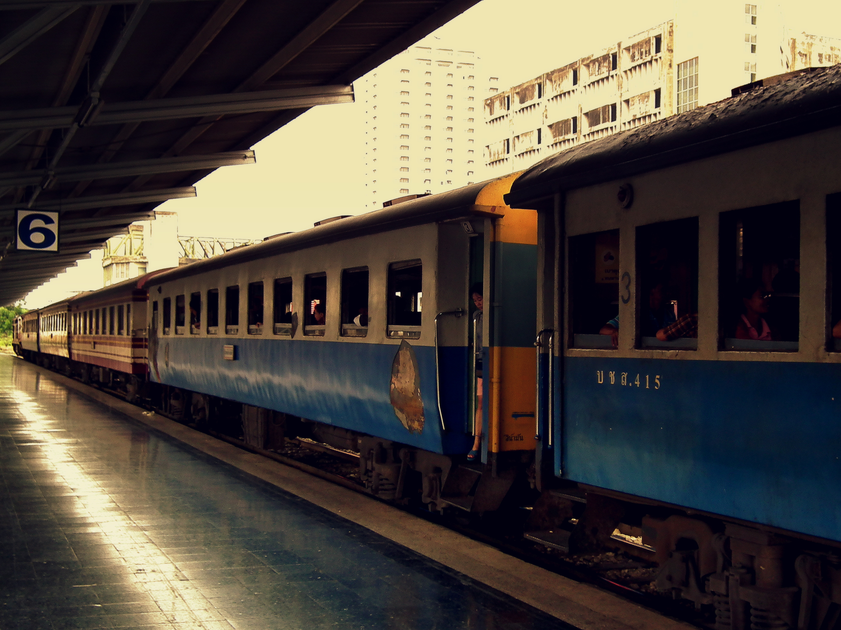 HUALAPHONG STATION BANGKOK THAILAND JAN 2012